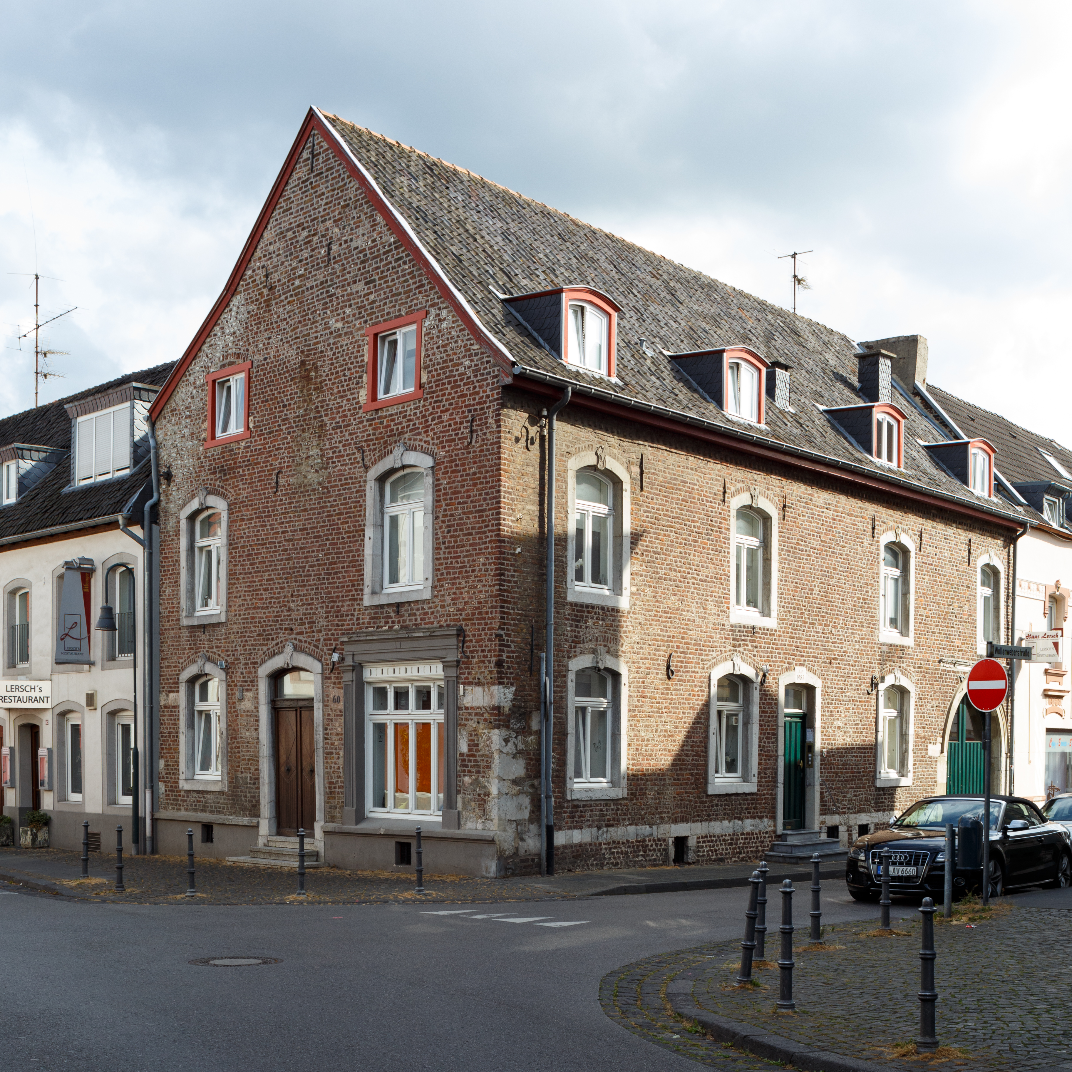 Ehemalige Schombartapotheke in Eschweiler, heute Wohnhaus.